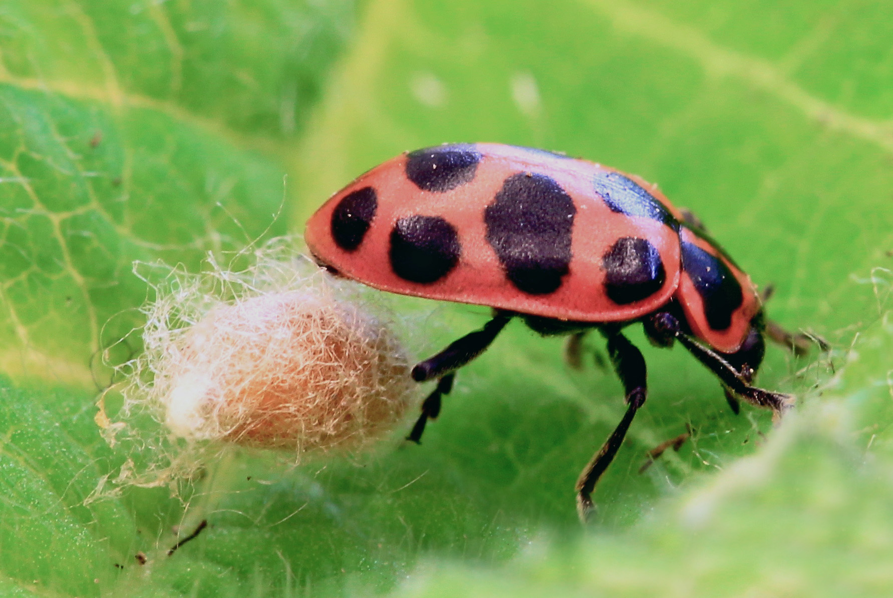 Cocon protégé par une coccinelle maculée